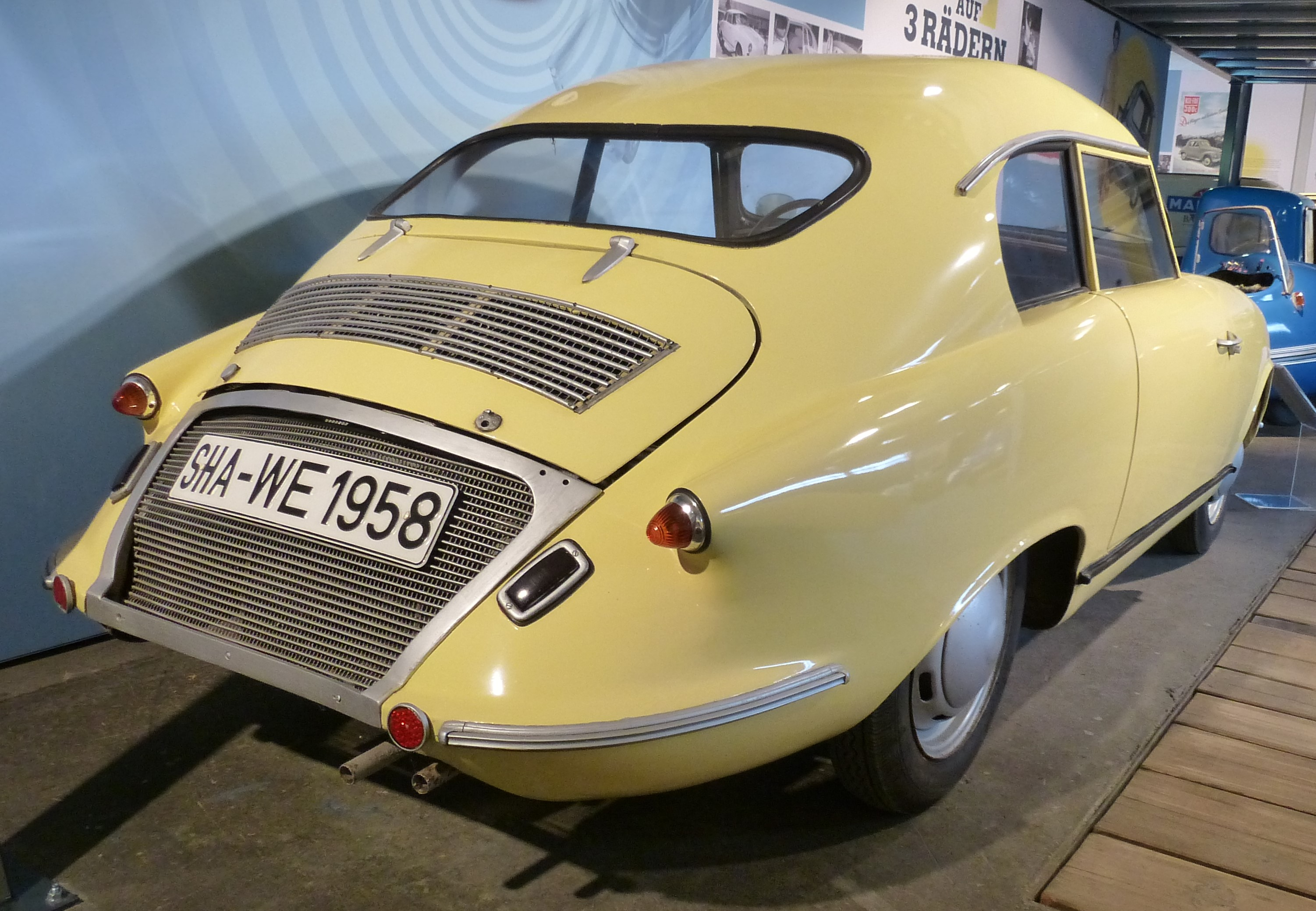 Weidner 70 S von 1958